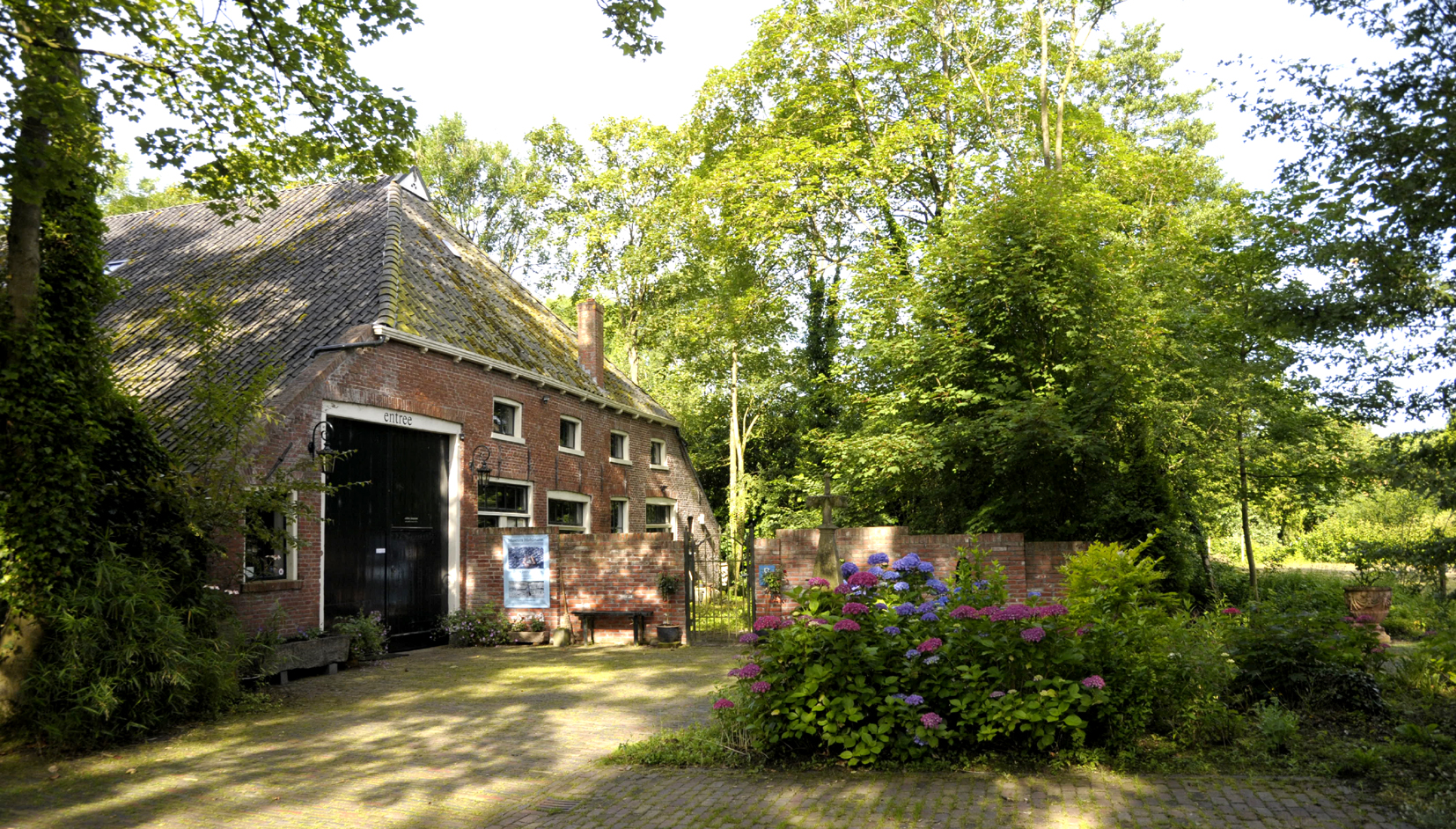 Entree Museum Møhlmann te Appingedam